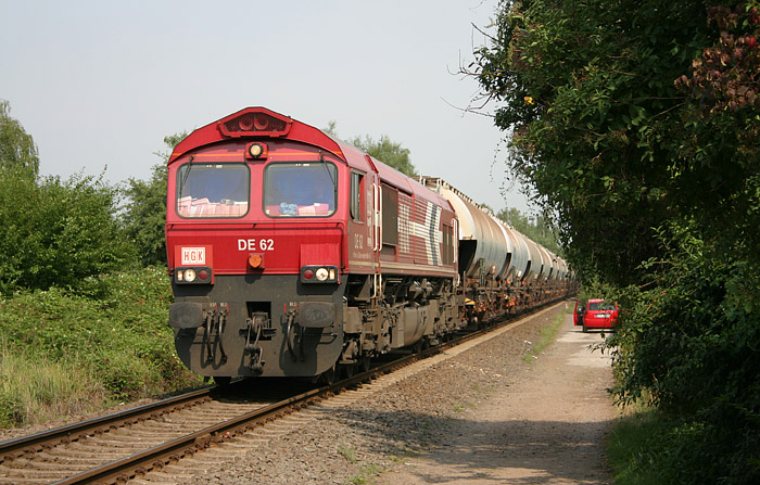 DE 62 mit leeren Wagen für den Transport von Braunkohlenstaub. Aufgenommen auf der KFBE unweit des Güterbahnhofs Köln-Niehl.